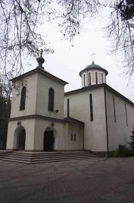 Cerkiew św. Eljasza na dojlidzkim cmentarzu prawosławnym.